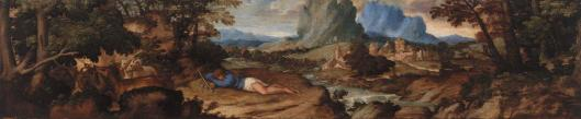 endimione dormientetitle QS:P1476,it:"endimione dormiente" label QS:Lit,"endimione dormiente"